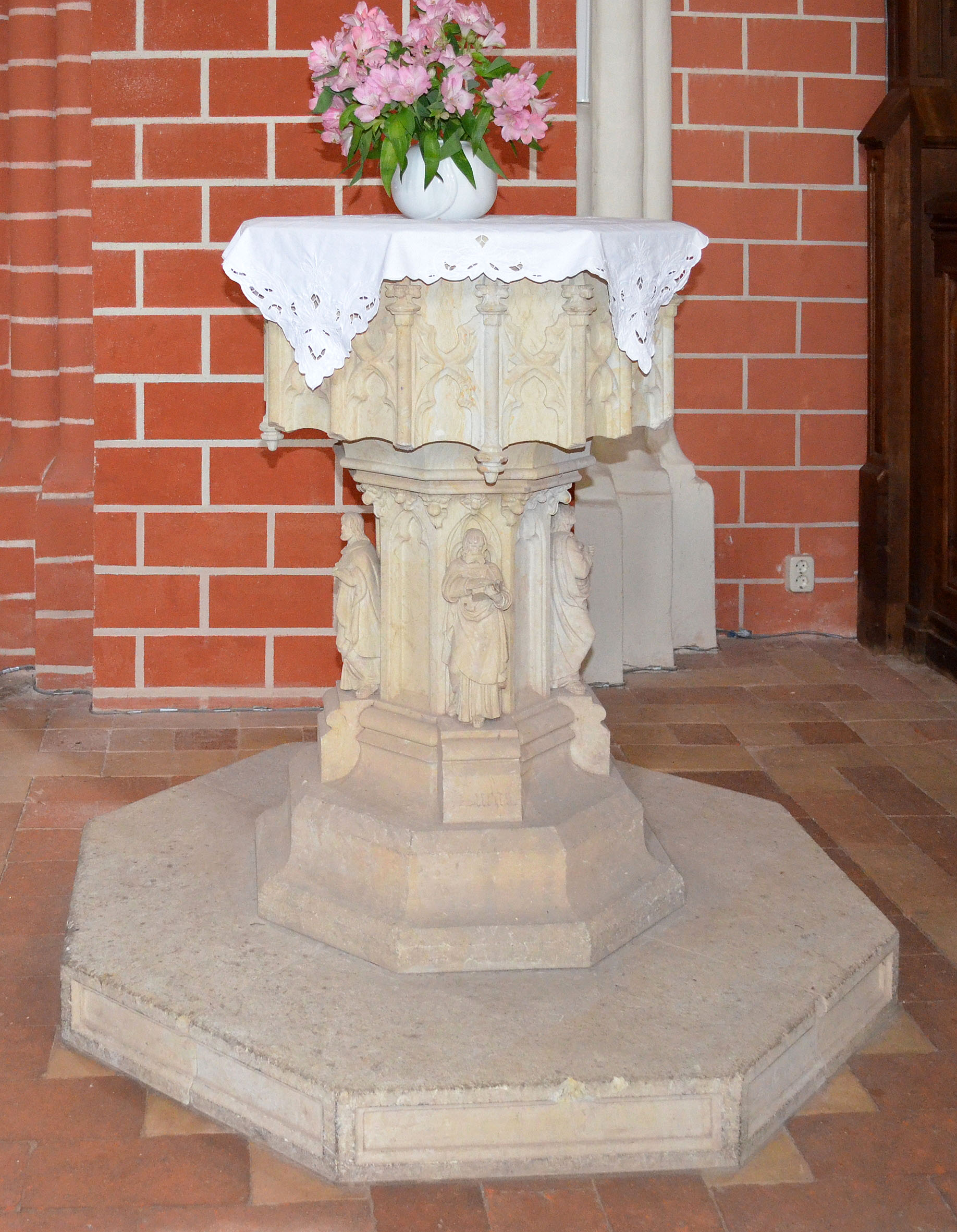 Röbel, Marienkirche, Taufstein 1